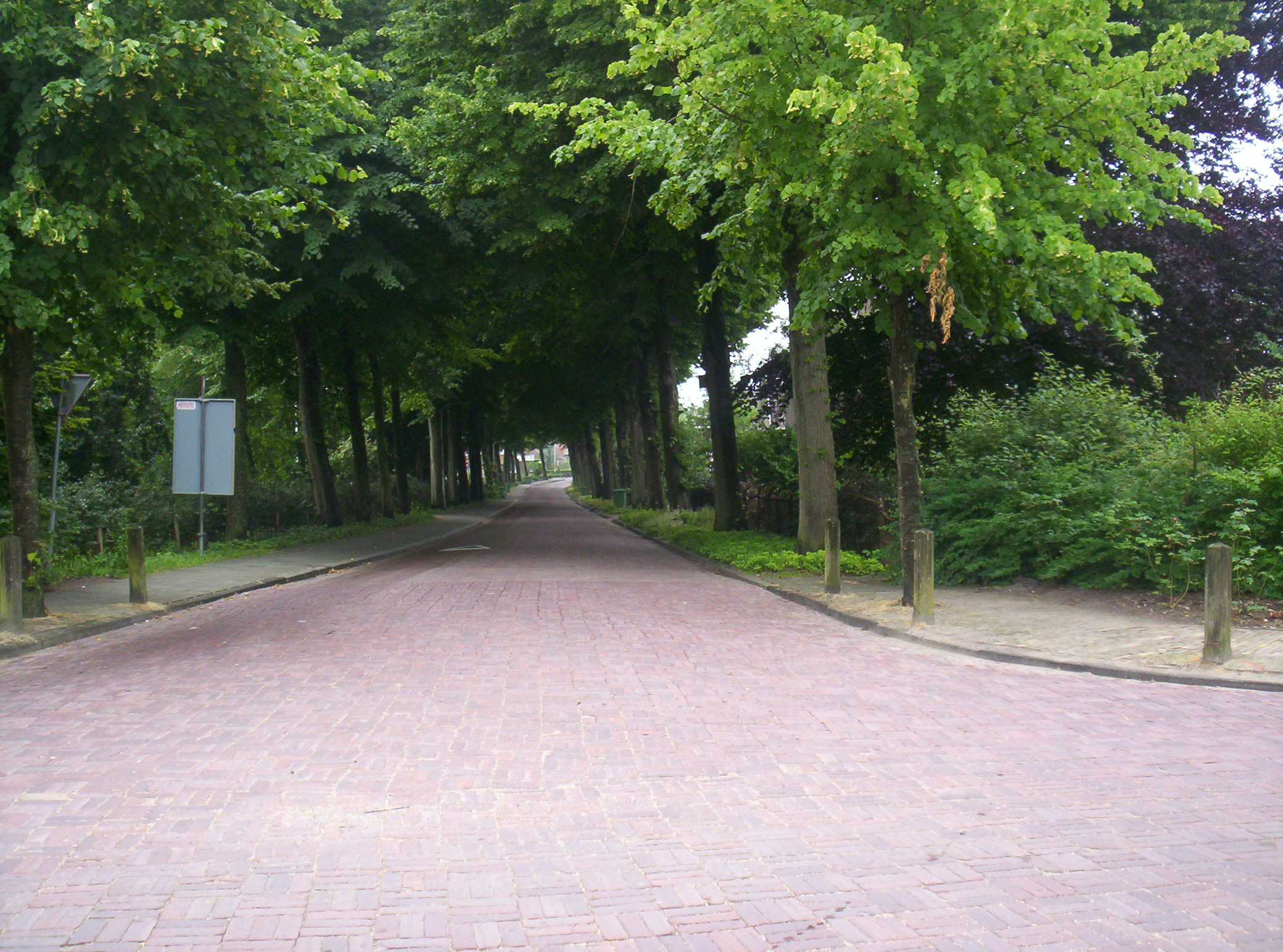 De Dammenseweg